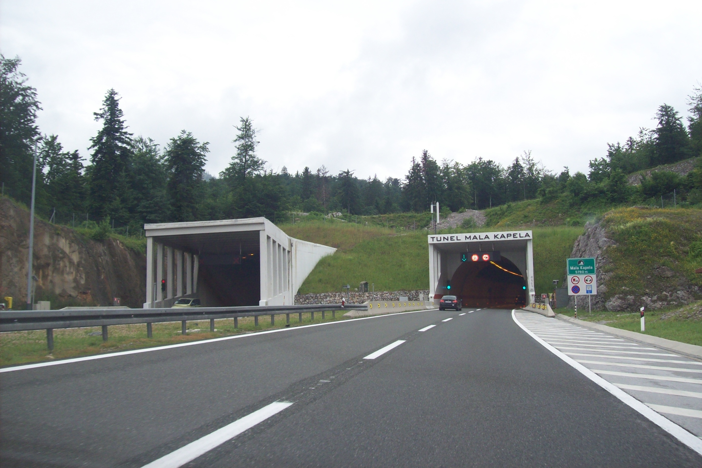 Tunnel Mala Kapela, Croatia